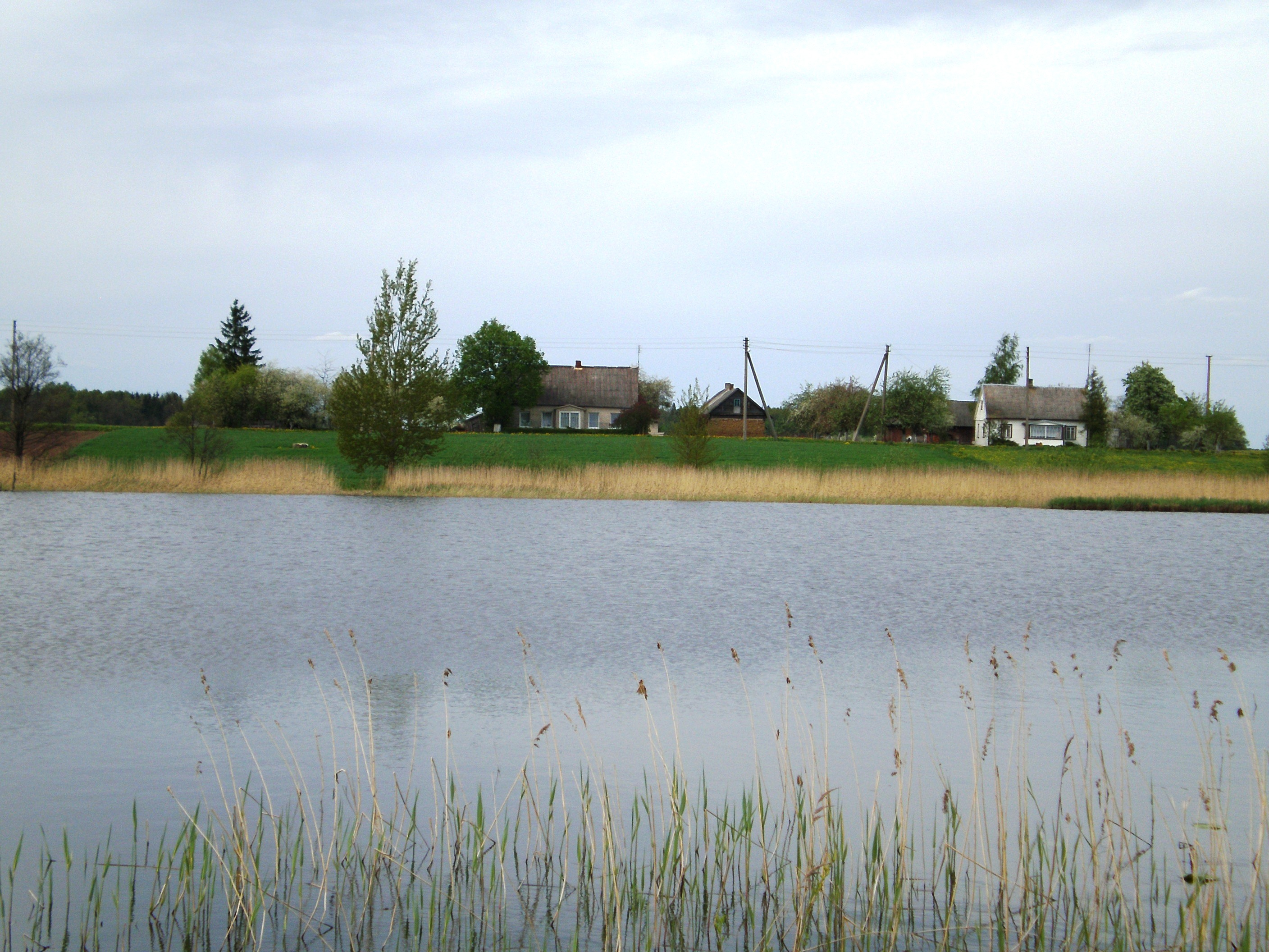 Antežeriai prie Baublio ežero, Krakių sen., Kėdainių raj.